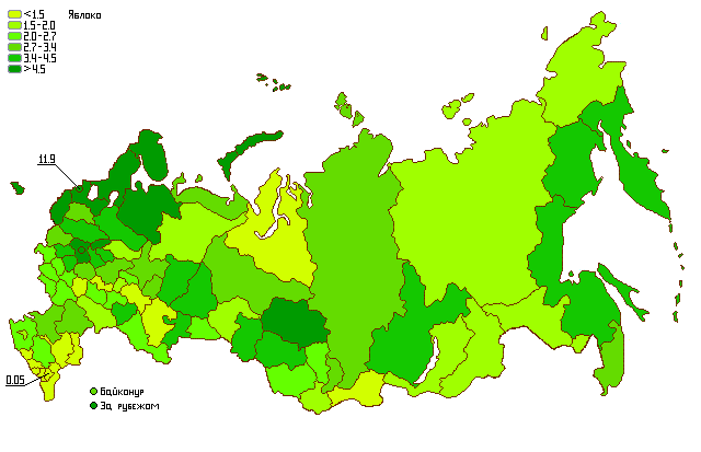 Результаты РОДП "Яблоко" на парламентских выборах 2011 года